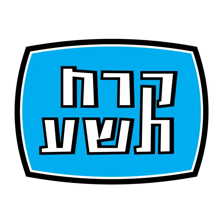 לוגו הלהקה